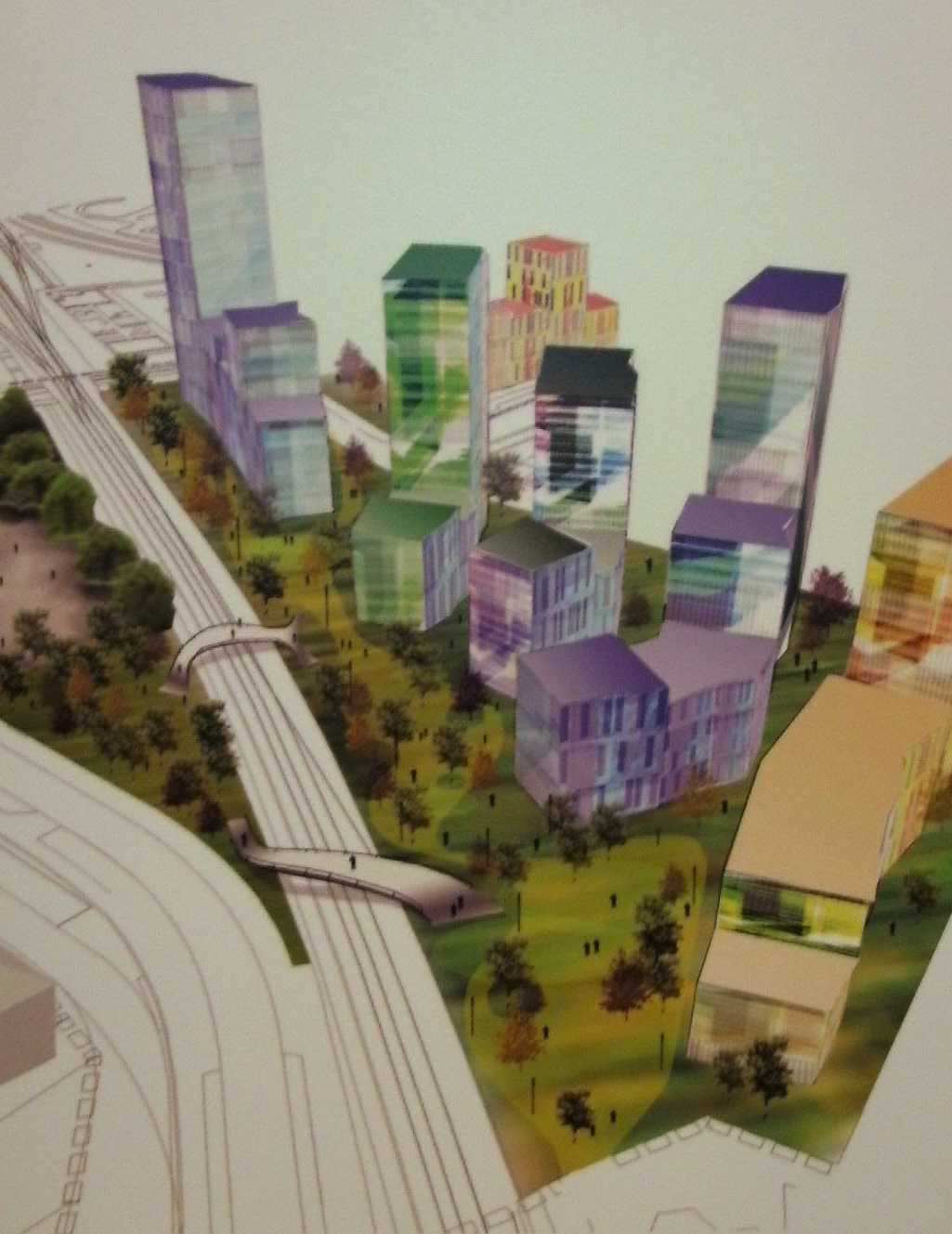 Imagen virtual del Barrio de San Nicasio tras la reurbanización proyectada.